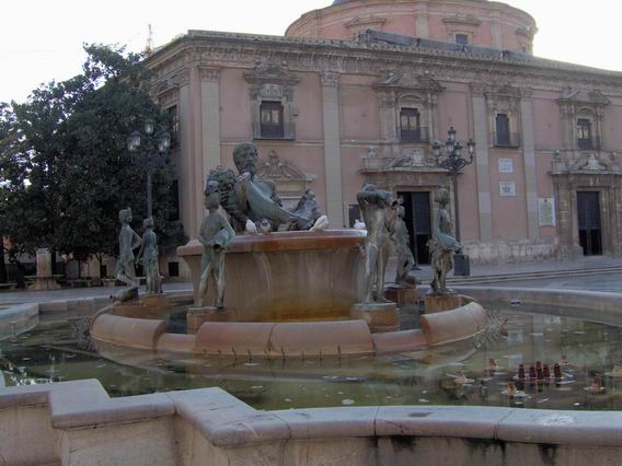 Basílica De La Virgen De Los Desamparados, València, Spain.